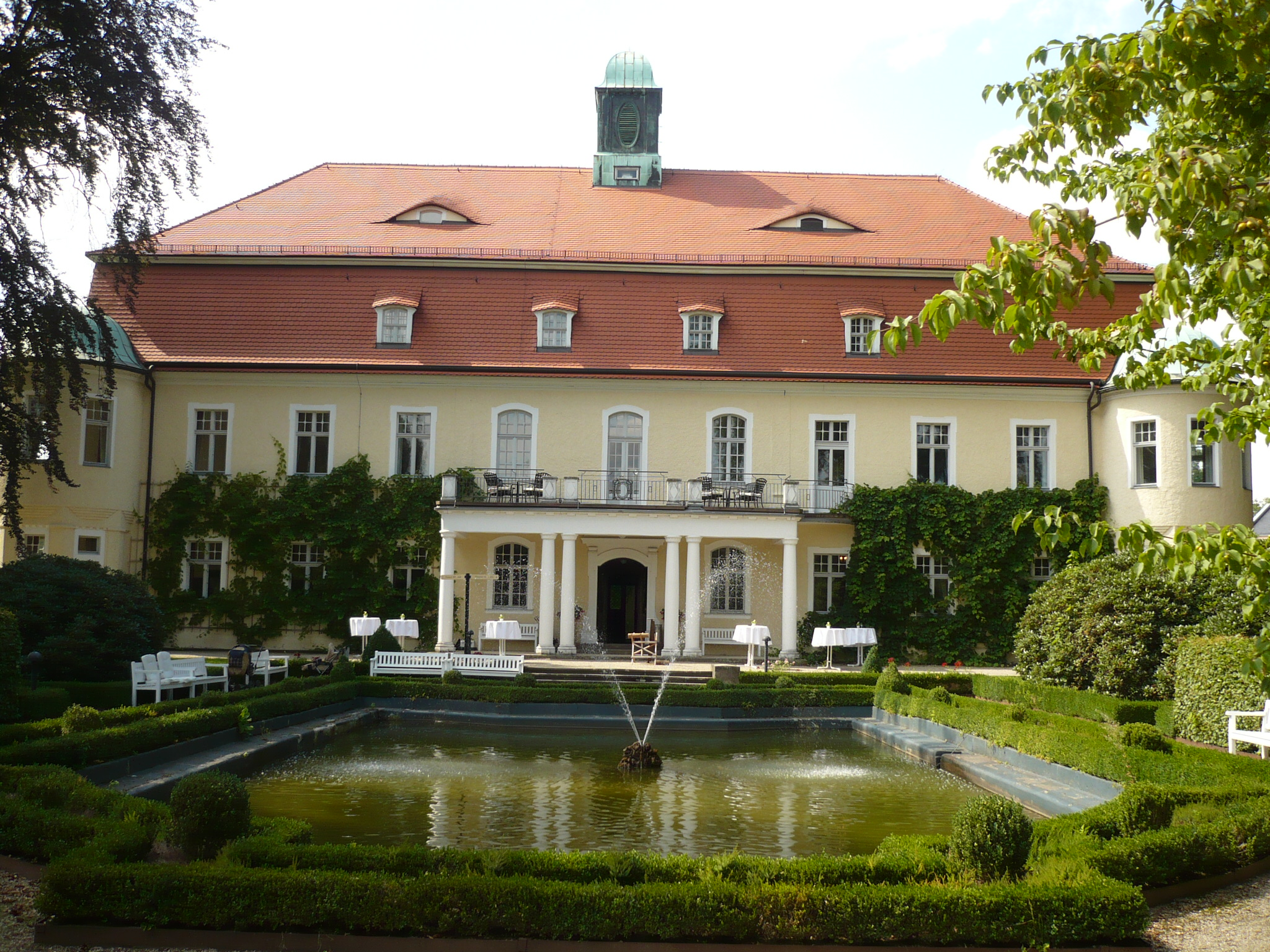 Barokowy ogród zamku Schweinsburg w Neukirchen Pleiße